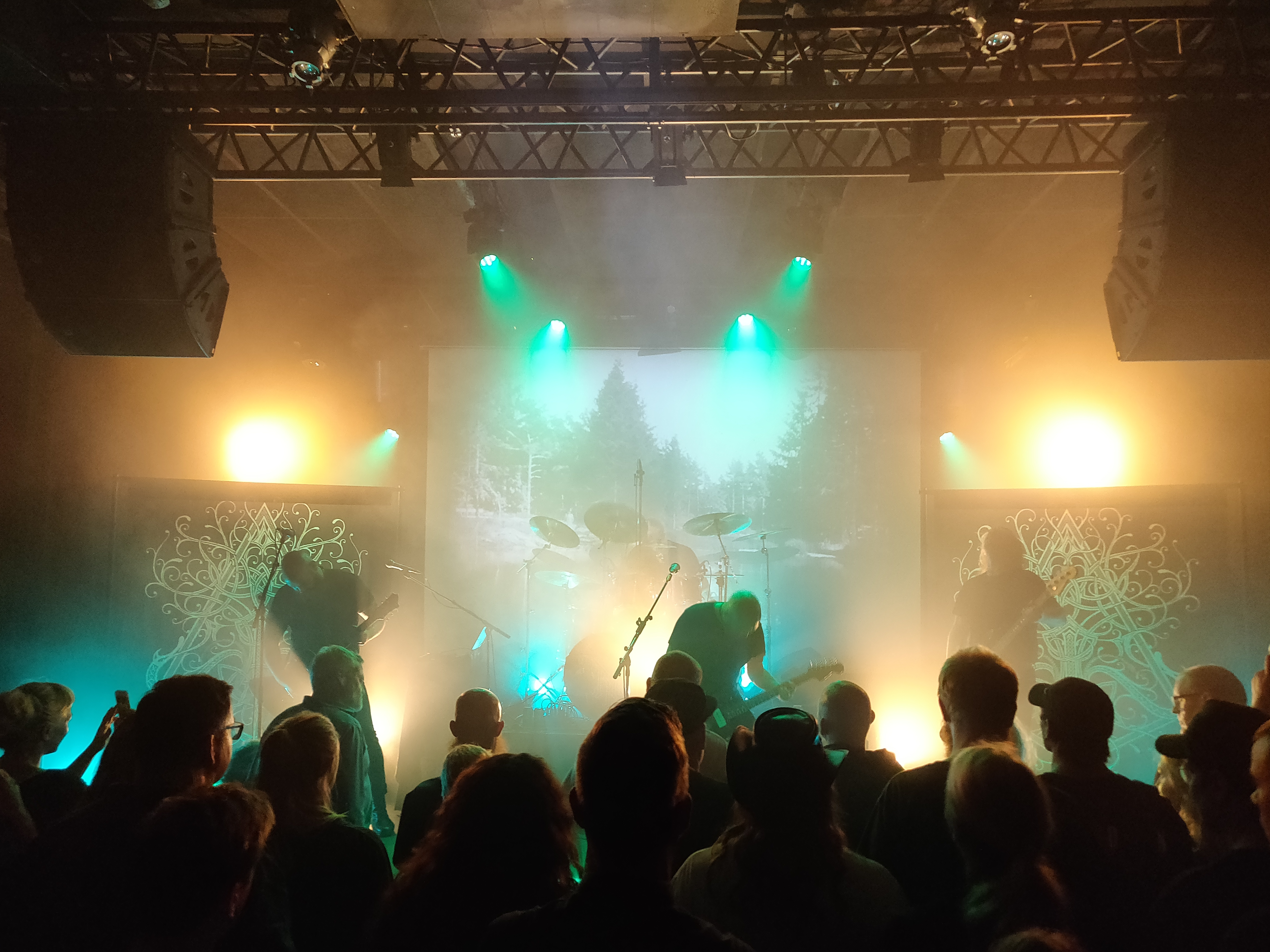 ORM Live på ALICE CPH